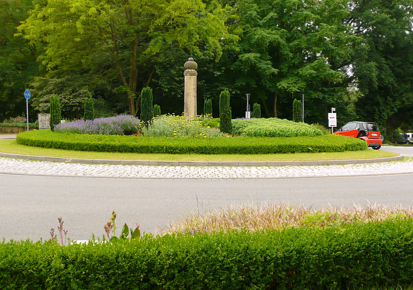 Kreisel in Bückeburg